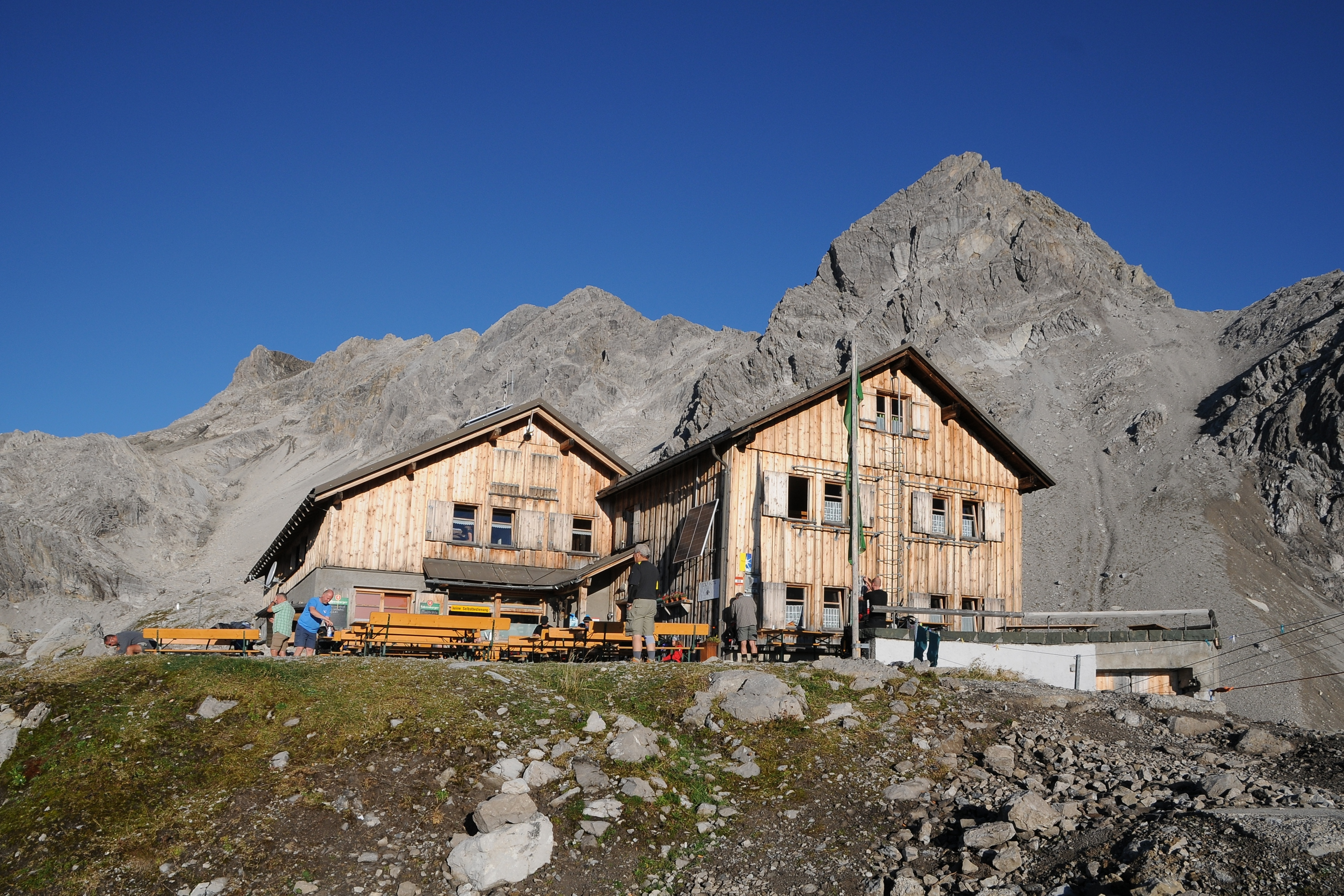 Die Totalphütte ist eine Schutzhütte des österreichischen Alpenvereins im Rätikon (Vorarlberg). Sie liegt auf 2385 Metern Höhe am Aufstieg vom Lünersee zur Schesaplana 2.965m. Die Hütte ist mit dem Umweltgütesiegel des deutschen und österreichischen Alpenvereins ausgezeichnet.